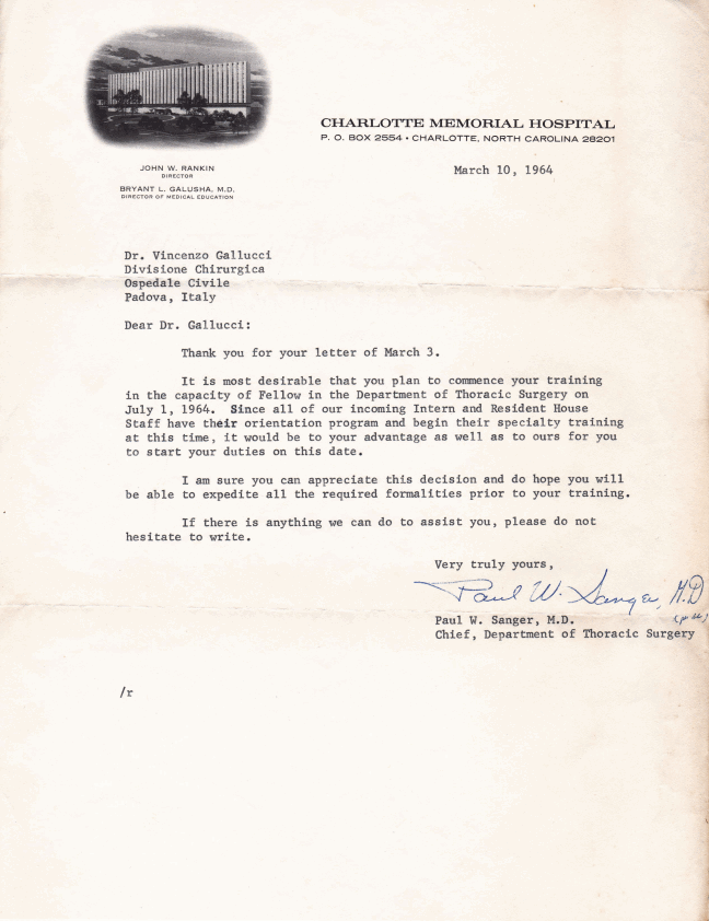 Invito da parte di Paul W. Sanger dello Charlotte Memorial Hospital (oggi Carolinas Medical Center) a Vincenzo Gallucci.